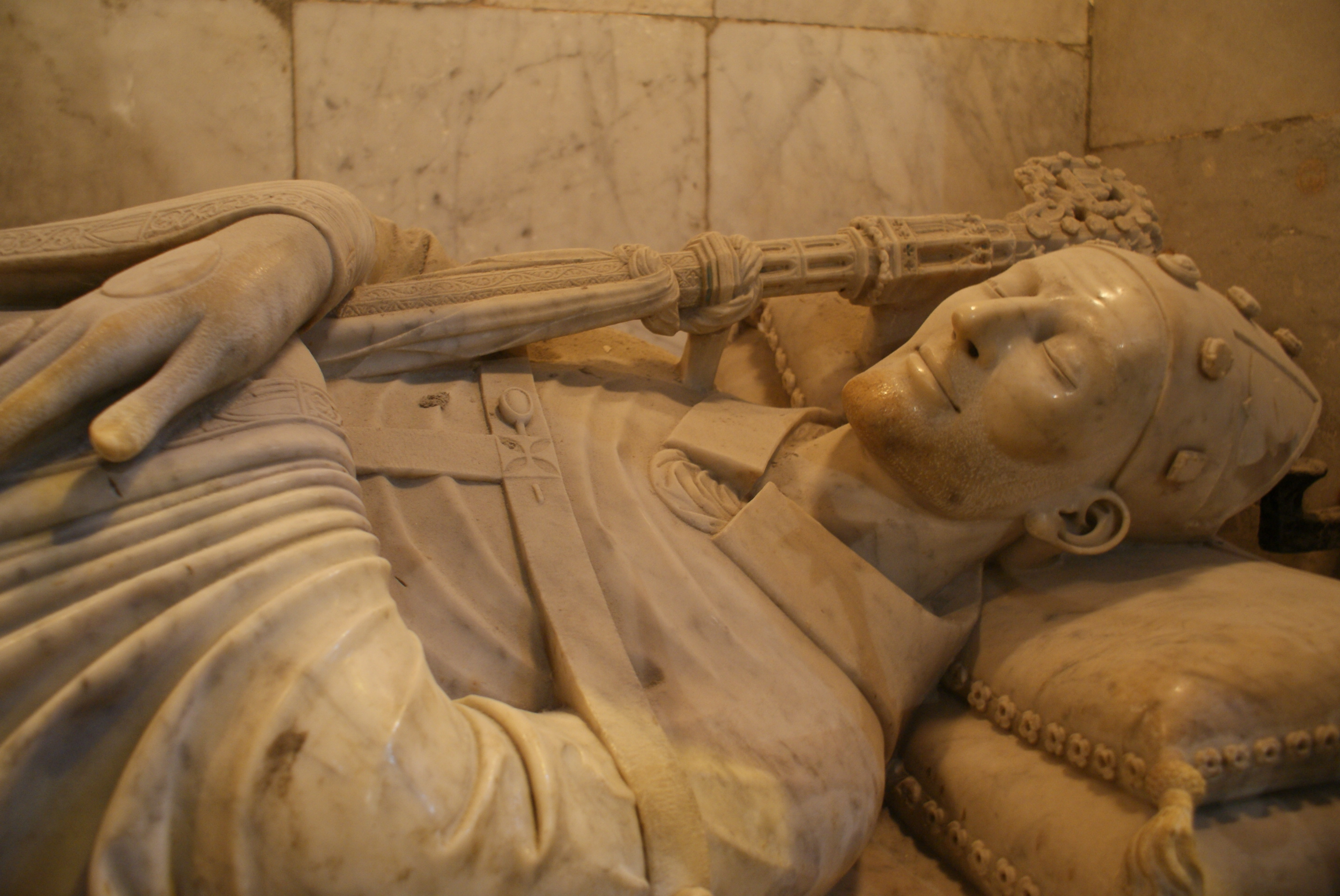 Sepulcro del arzobispo Juan de Aragón y Anjou en la catedral de Tarragona.